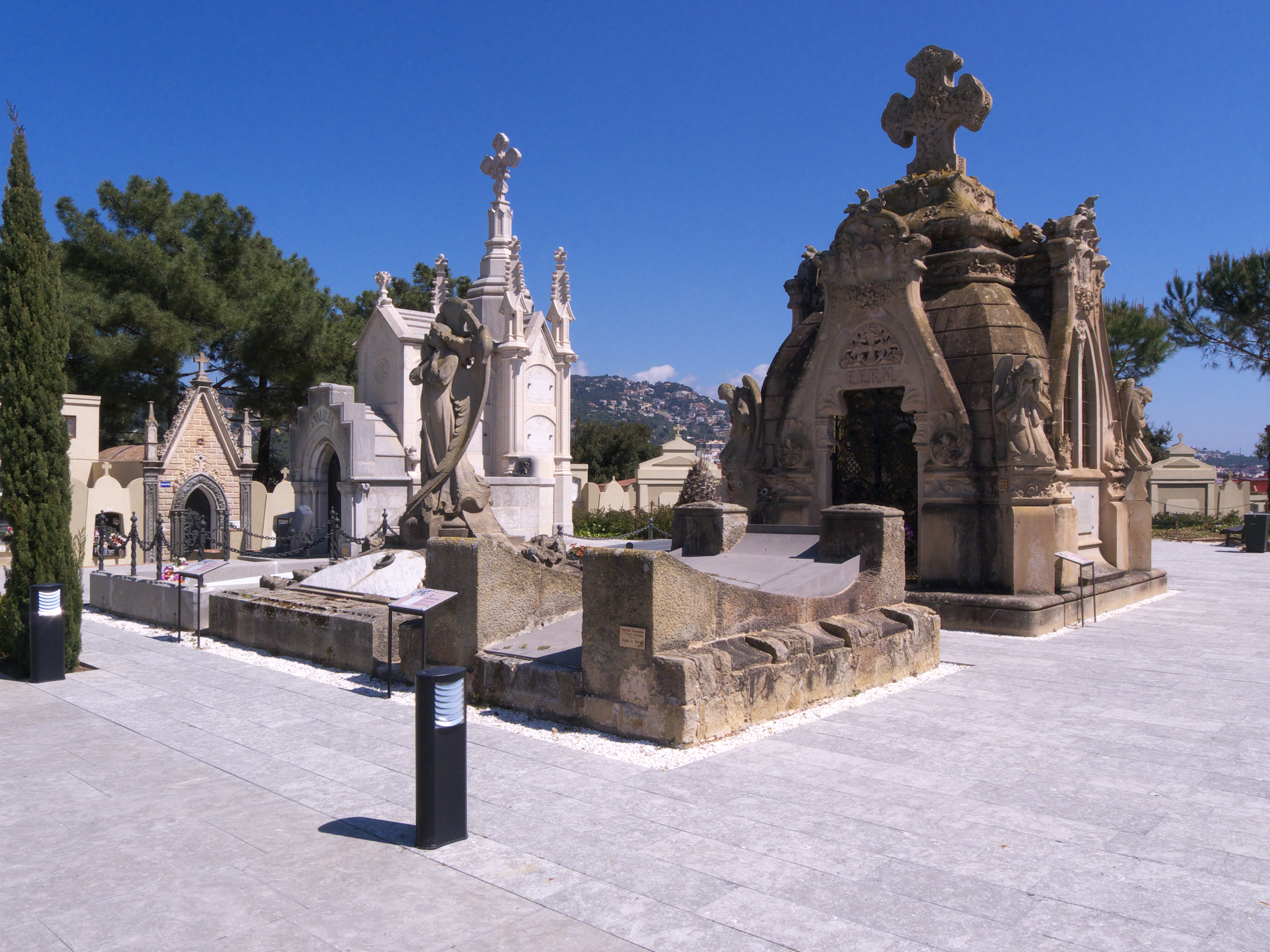 Destacado cementerio modernista proyectado por Joaquin Artau Fábregas